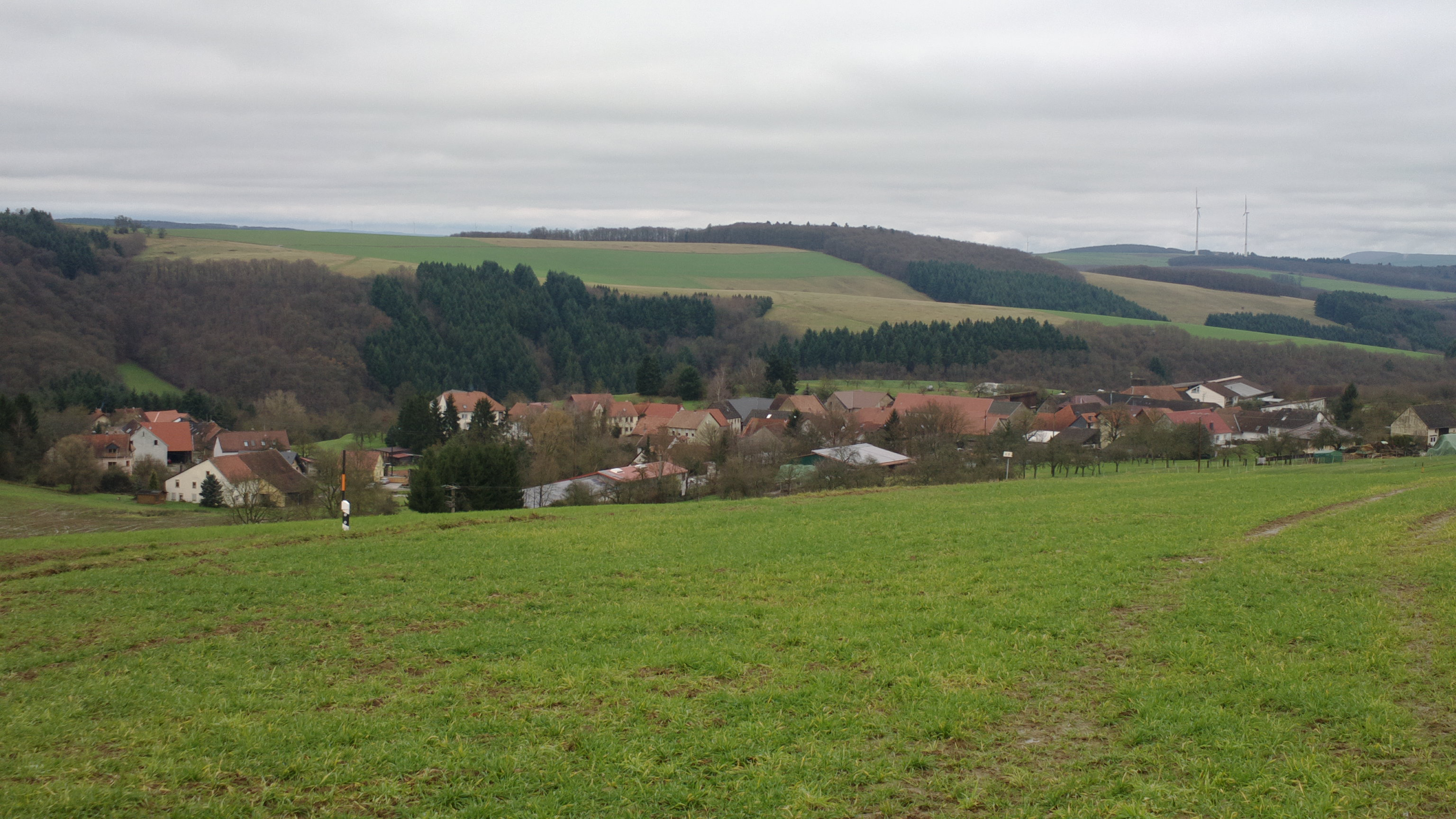 Buborn von oben